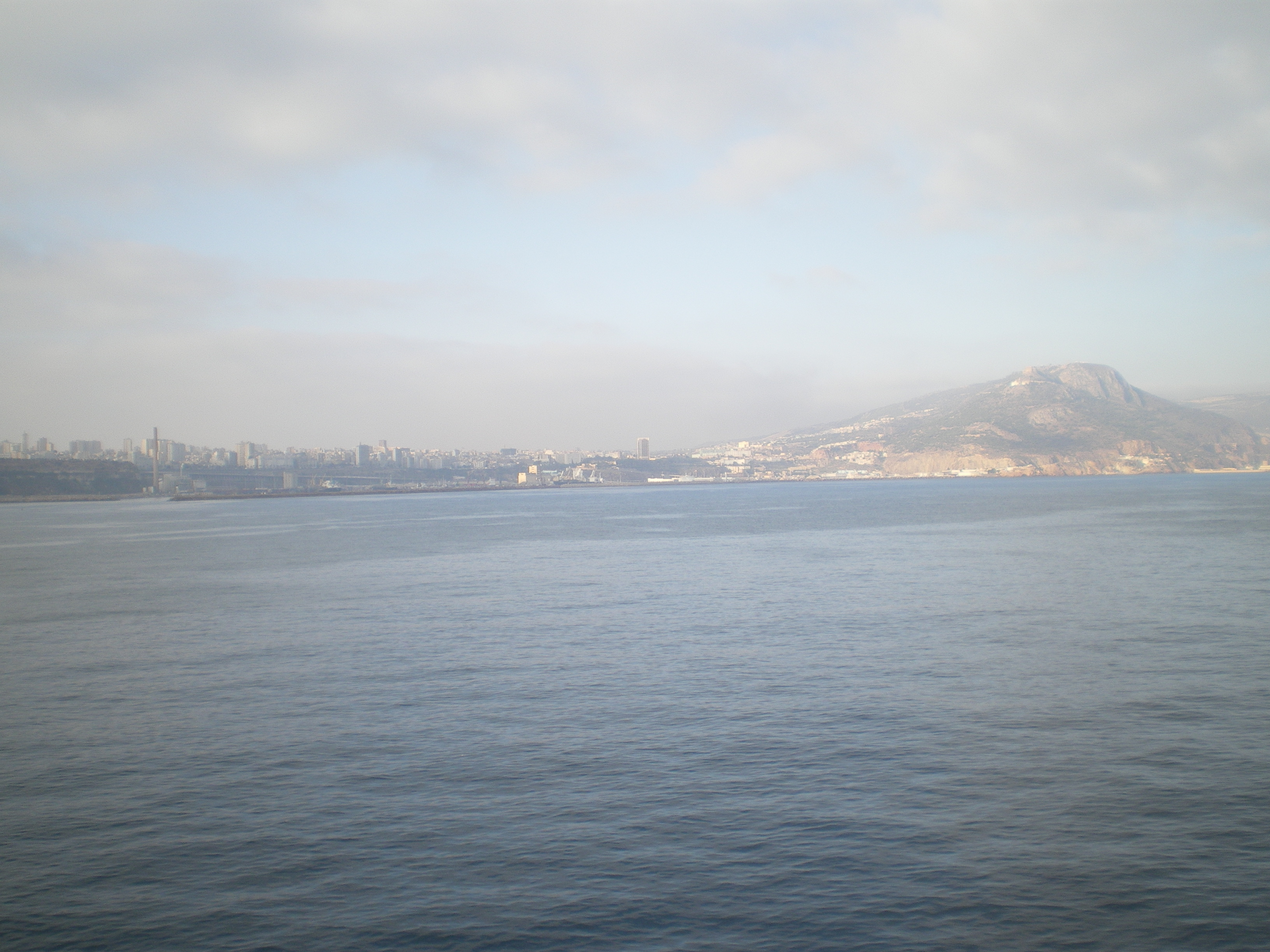 Oran et l'Aïdour vu de la mer Catégorie:Oran